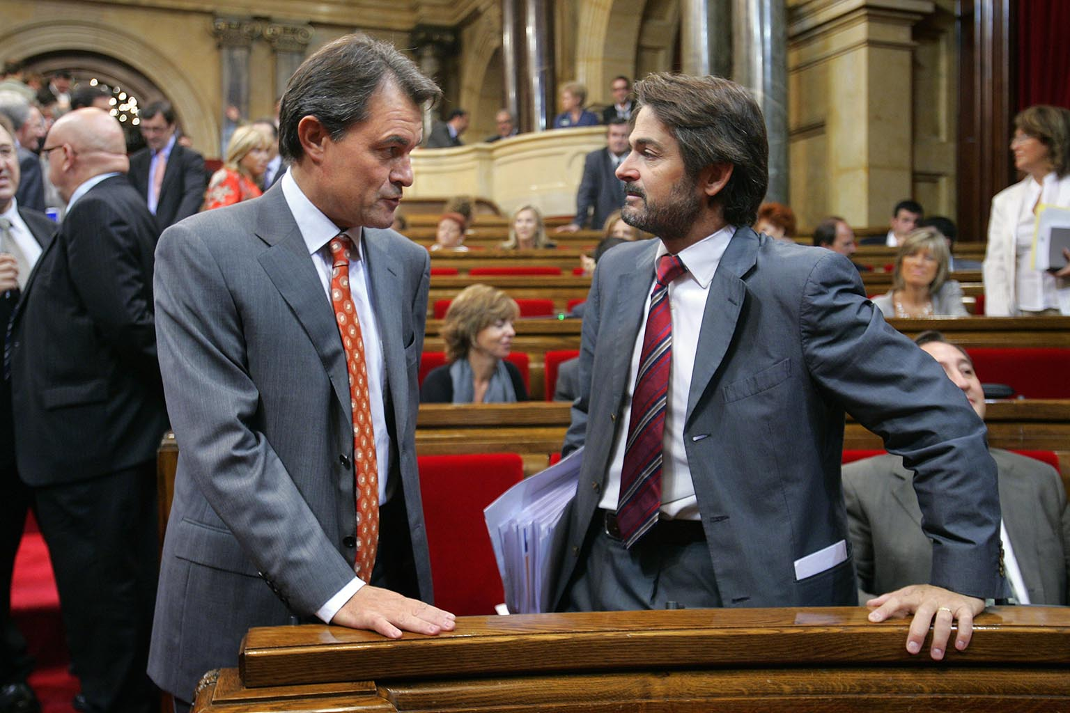 30.09.2009, BarcelonaDebat de política general al Parlament de Catalunya.